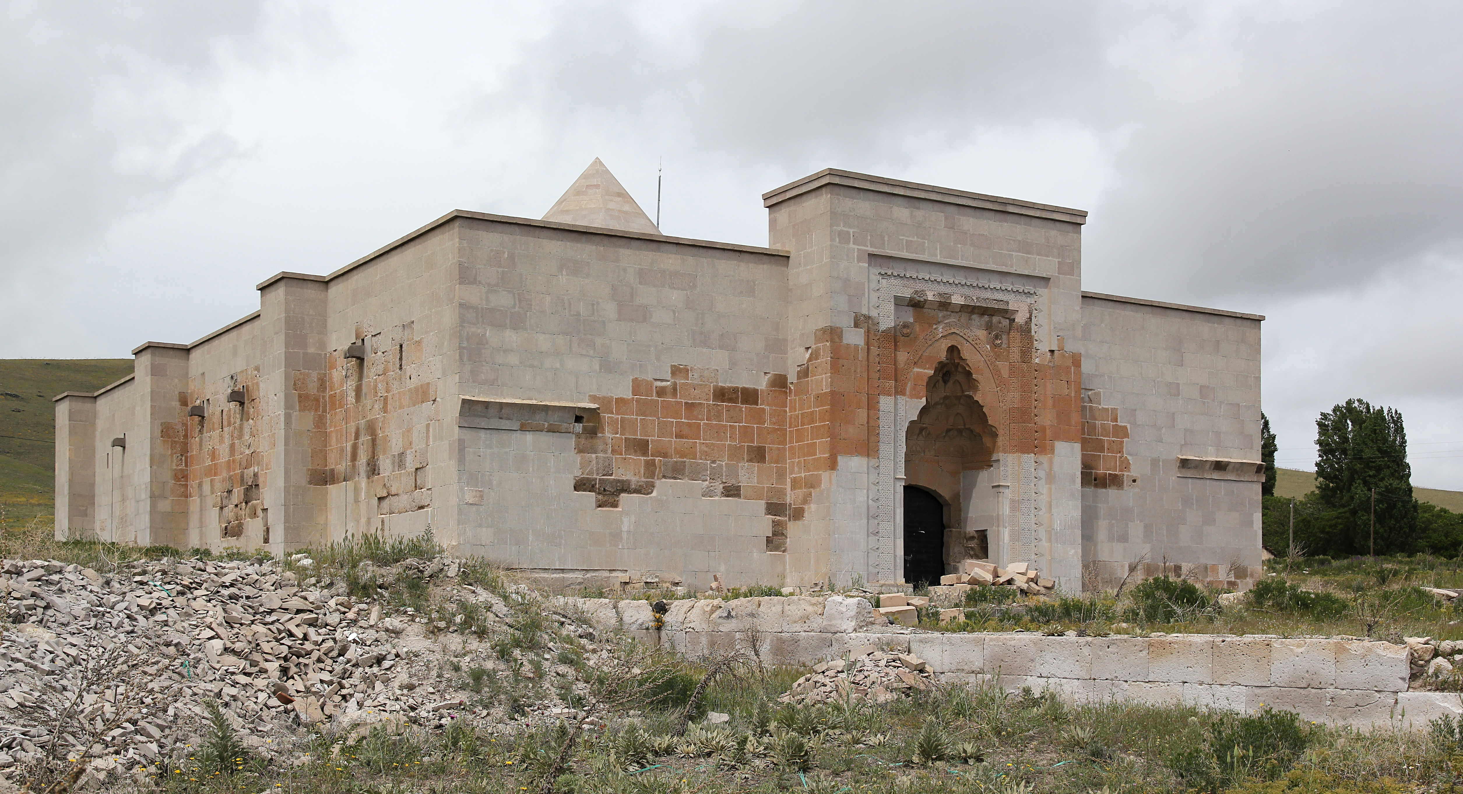 Alayhan, Karawanserei bei Aksaray, Zentraltürkei, Ansicht von Südwesten